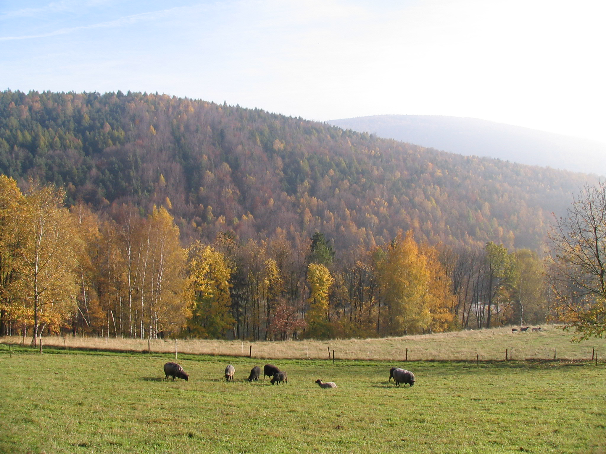 Der Eisenstein (Erzgebirge) bei Aue (Sachsen). Rechts im Hintergrund der Burkhardtswald.